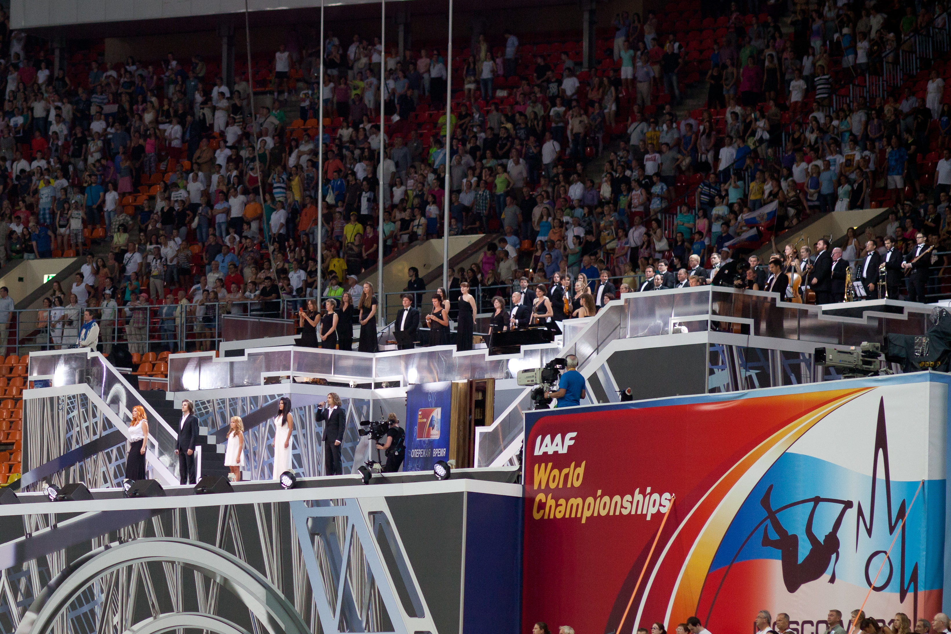 Первый день Чемпионата мира по легкой атлетике в Москве